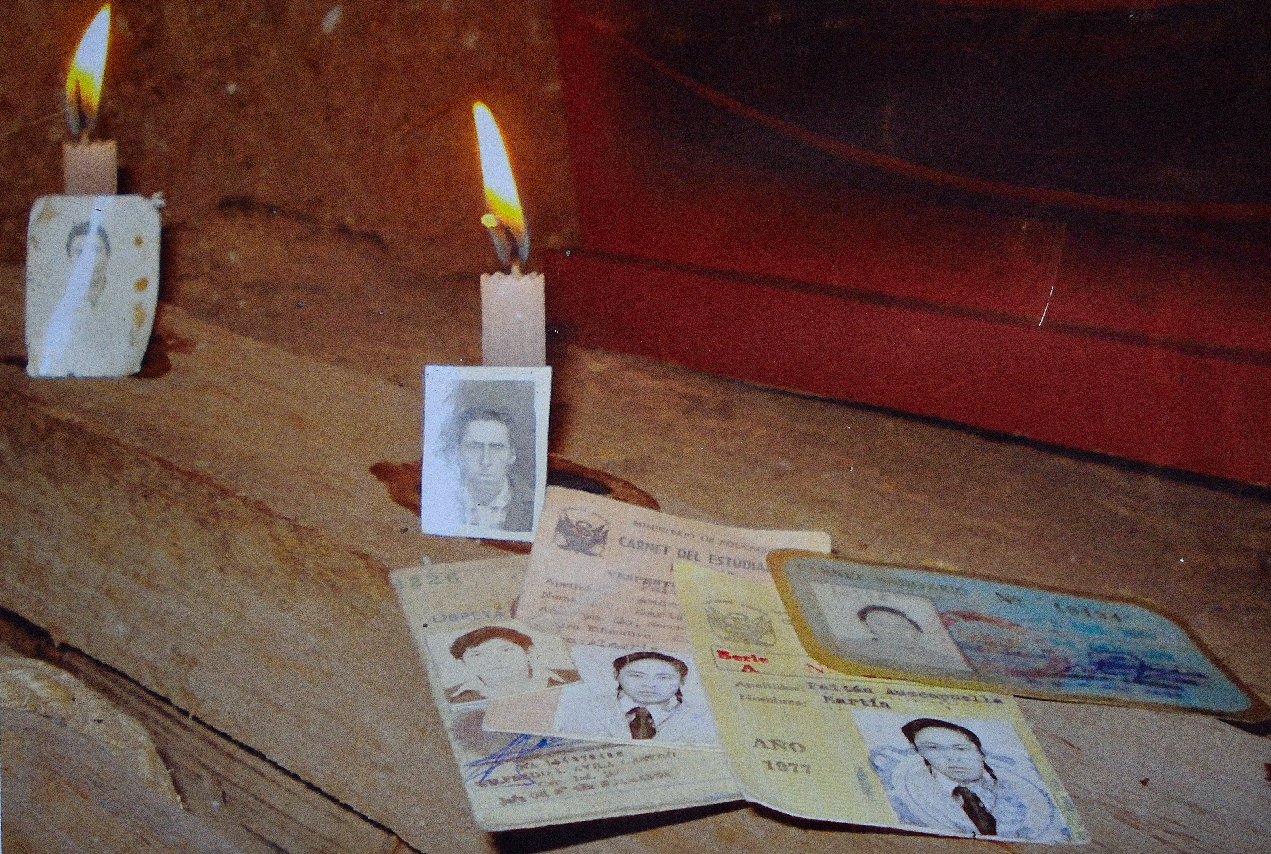 MUSEO